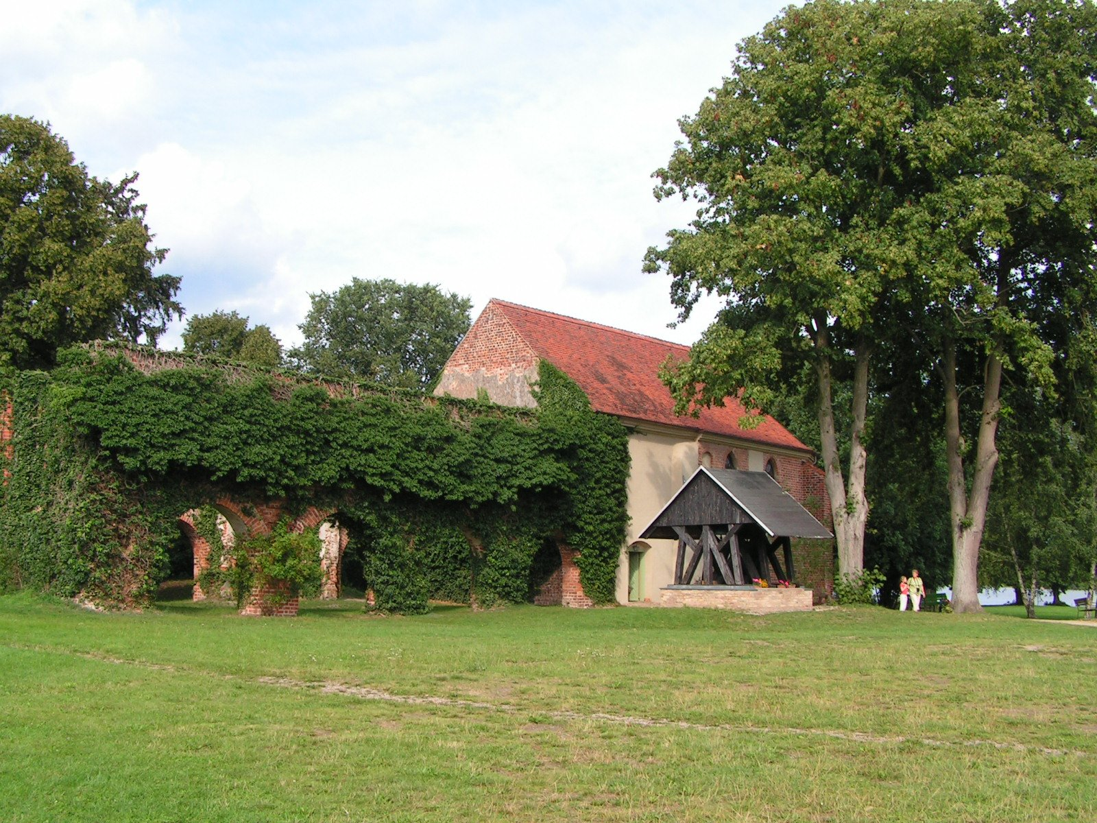 Himmelpfort_Kloster_Kirche